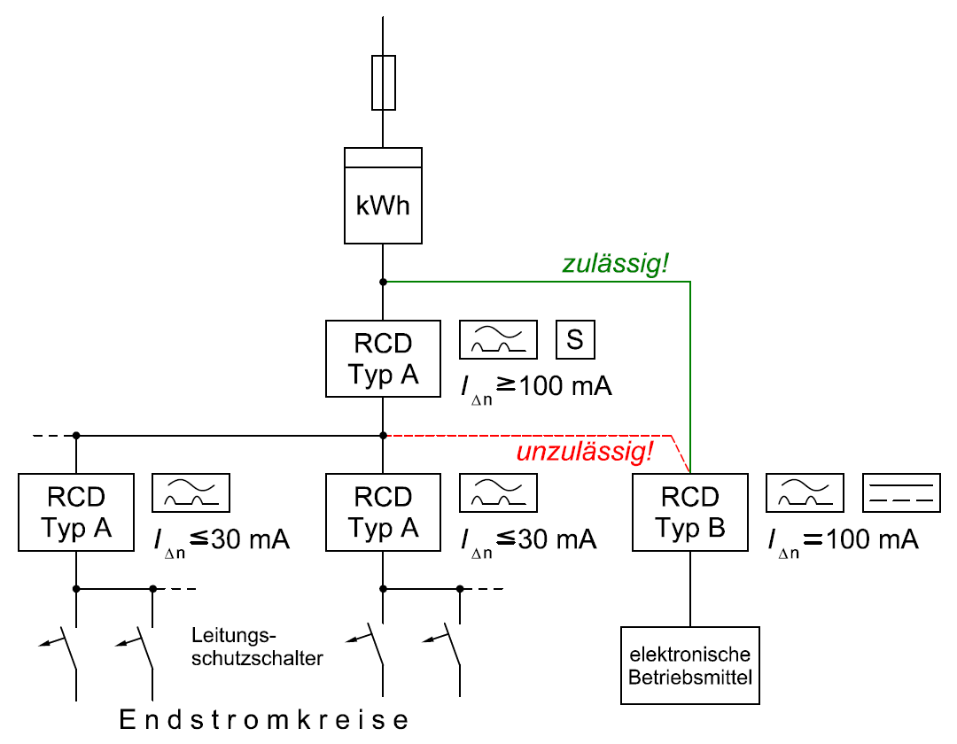 Schaltbild von in Reihe geschaltete RCDs zur Selektivität